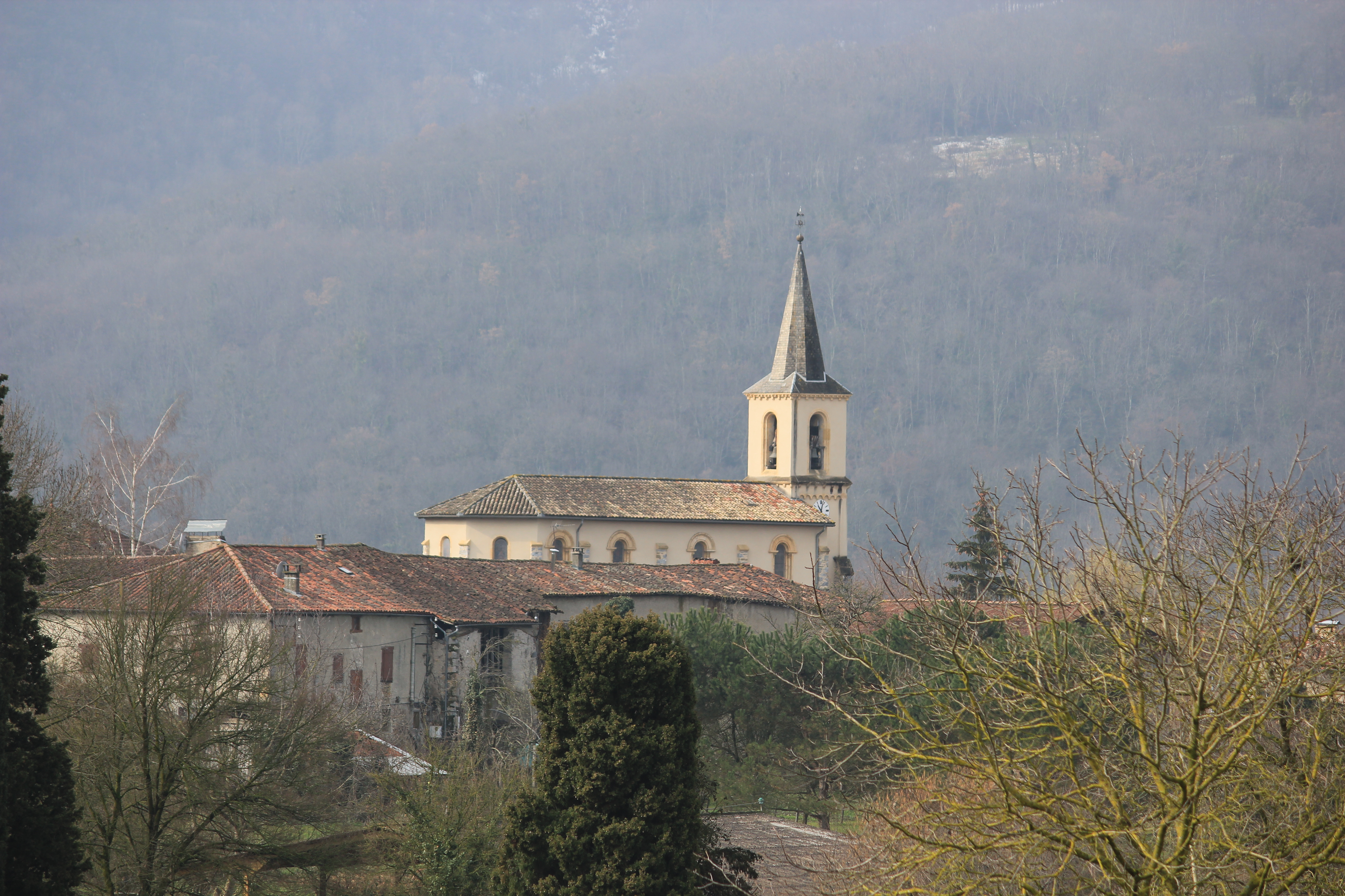 Urau (Haute-Garonne, Midi-Pyrénées, France) : L'église.